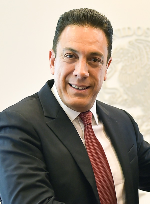 El Presidente Enrique Peña Nieto se reunió con el Gobernador Electo de Hidalgo, Omar Fayad Meneses, a quien refrendó la voluntad y el compromiso del Gobierno de la República por respaldar las acciones que permitan elevar los niveles de bienestar de los hidalguenses.